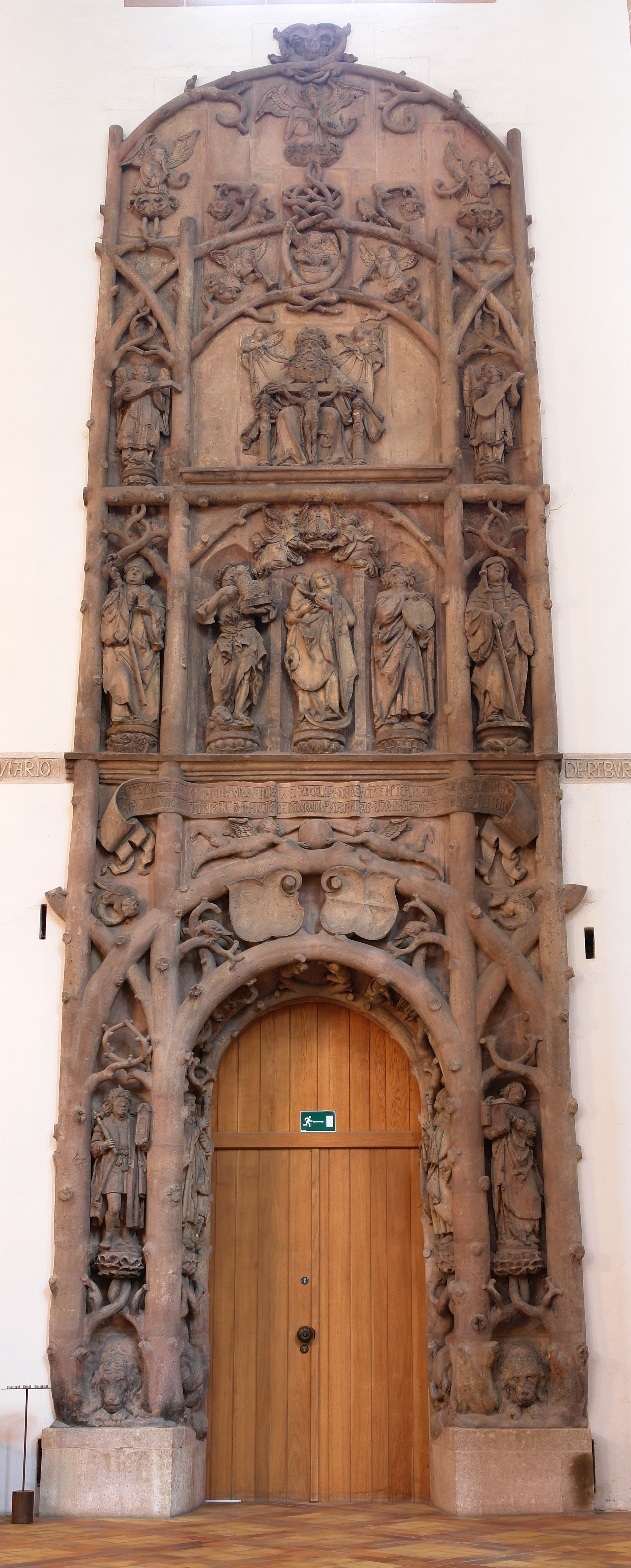 Nordportal mehr Infos unter